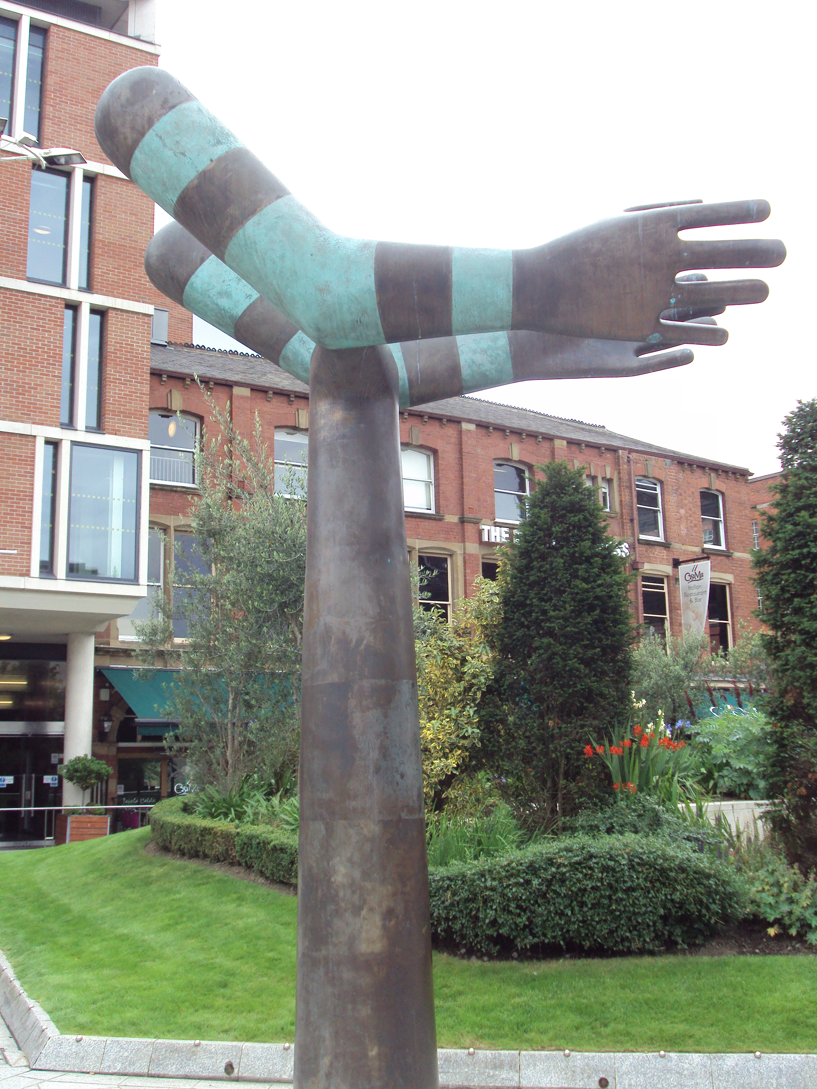 Helping Hands sculpture in Mandela Gardens, Millennium Square, Leeds.